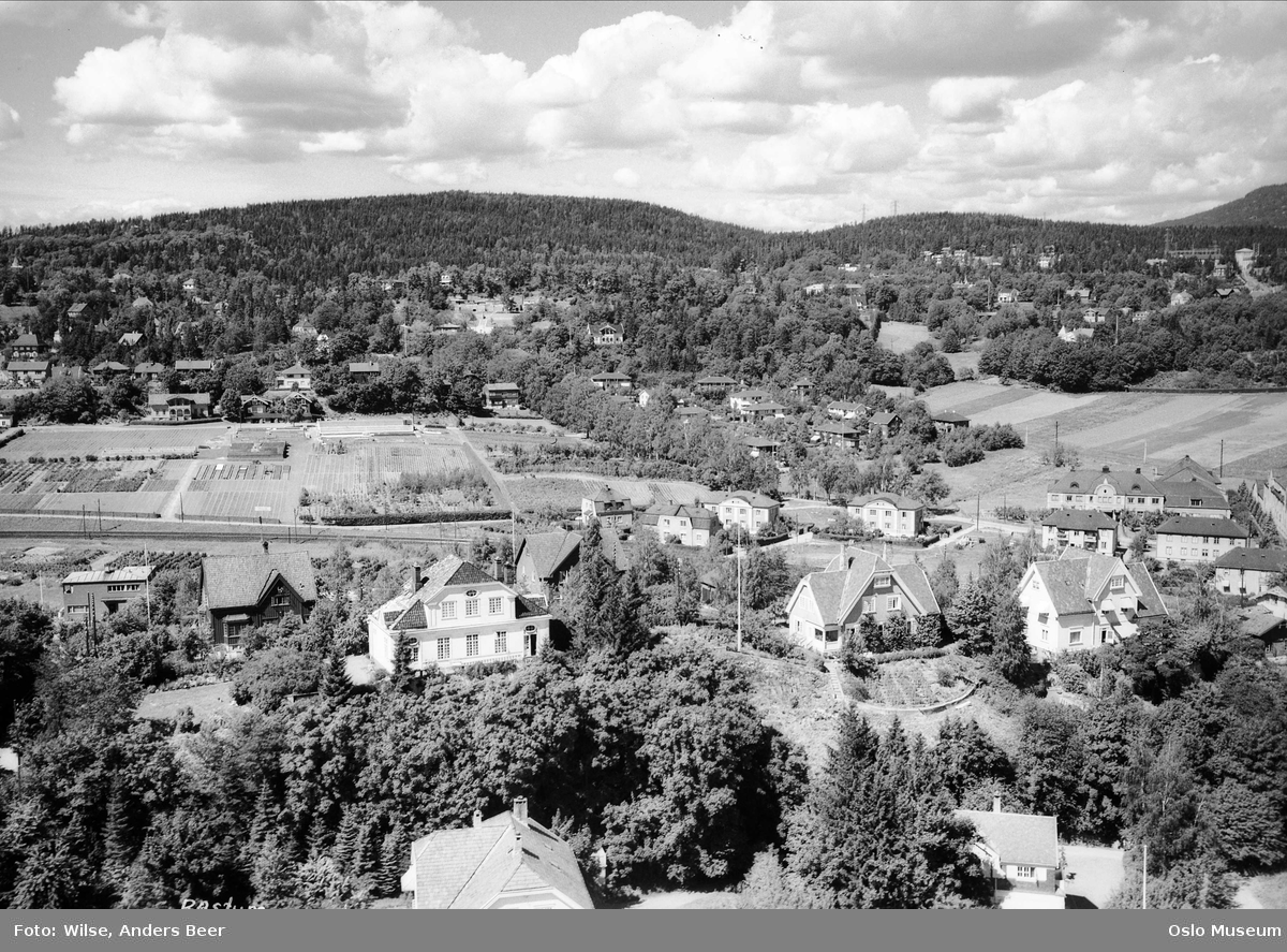 Bestum i Oslo anno 1936. Ullernåsen i bakgrunnen.